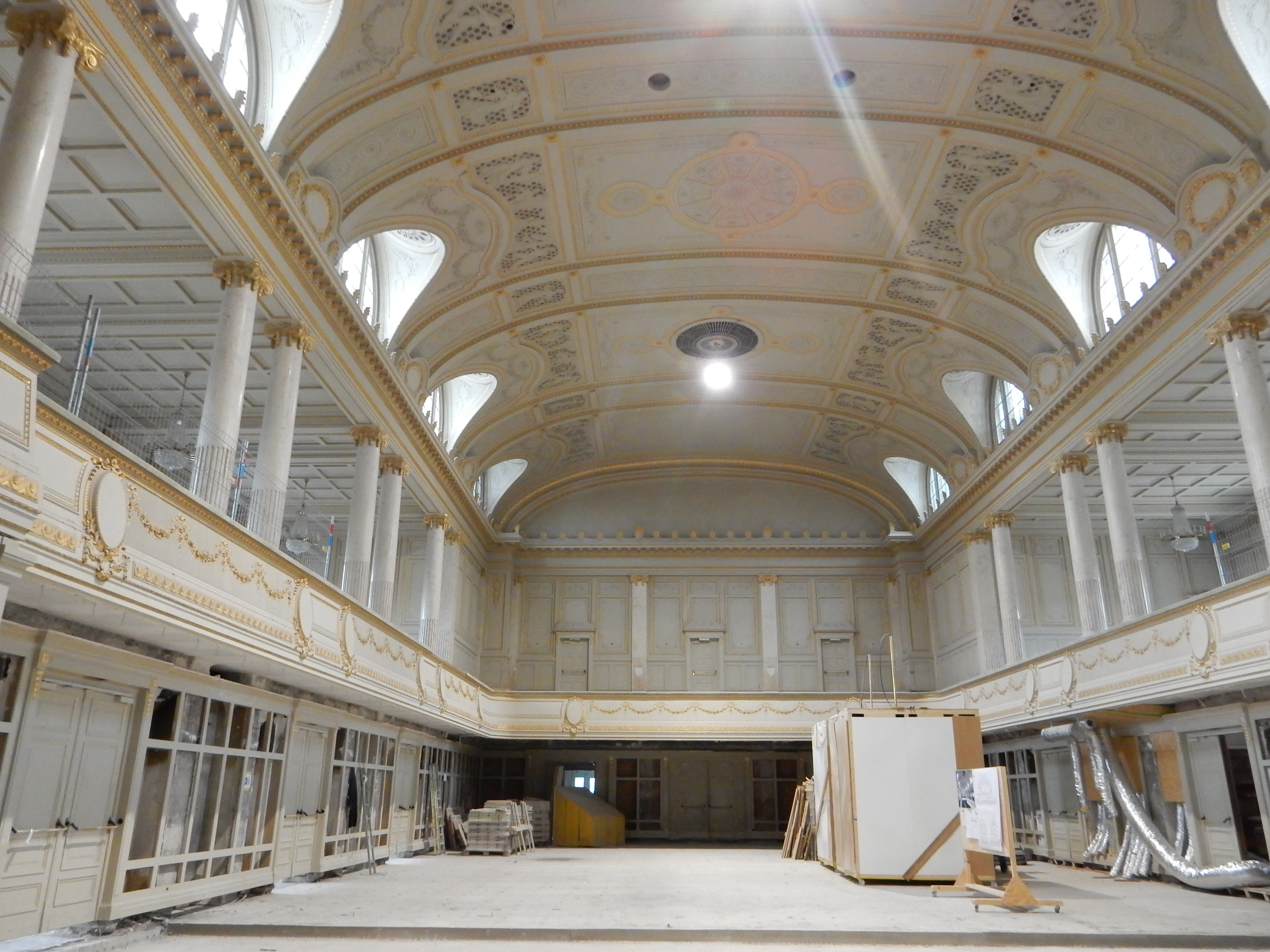 Casino (Bern): Gesamtsanierung des Gebäudes, Konzertsaal